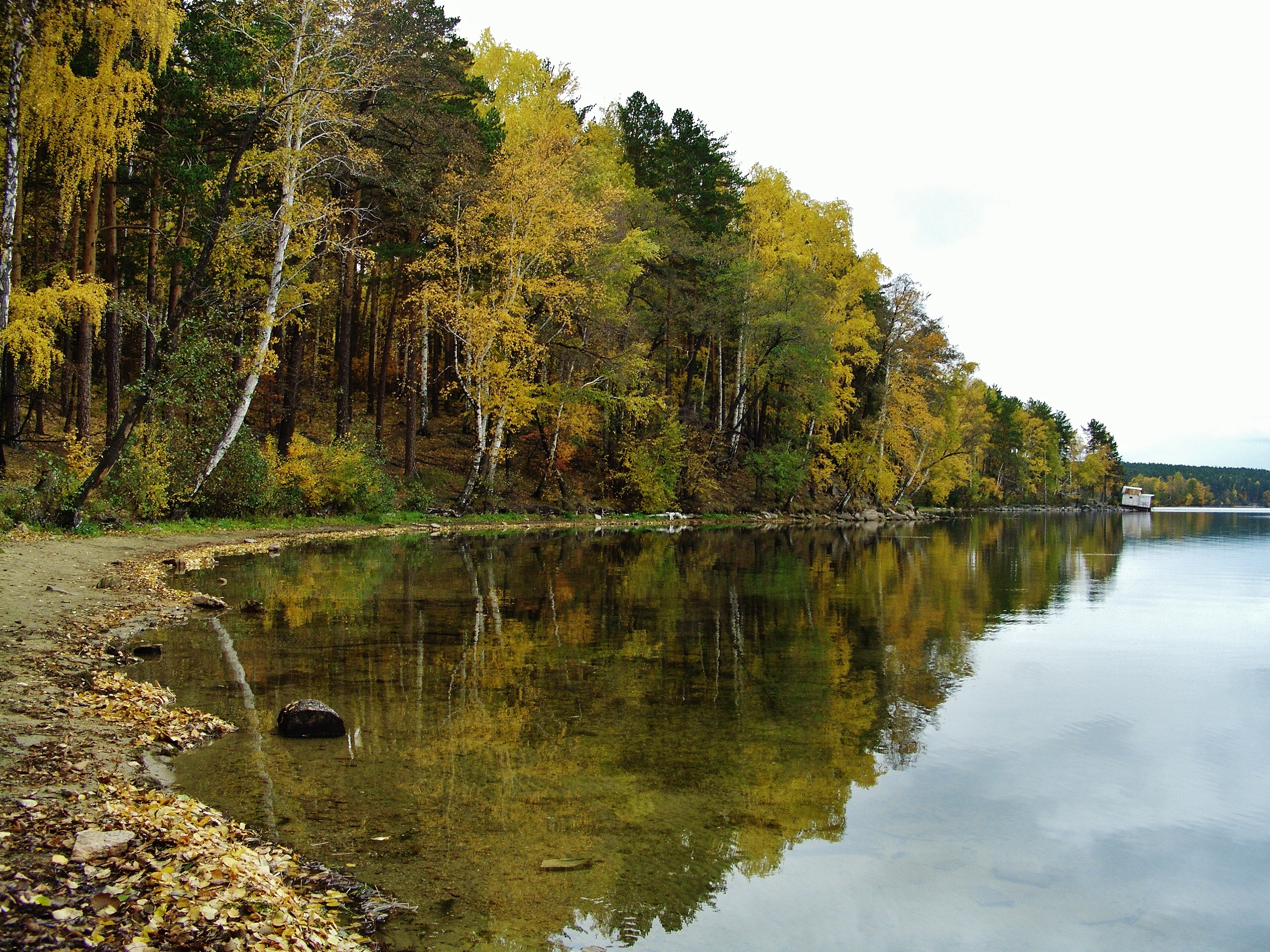 озеро Еловое.